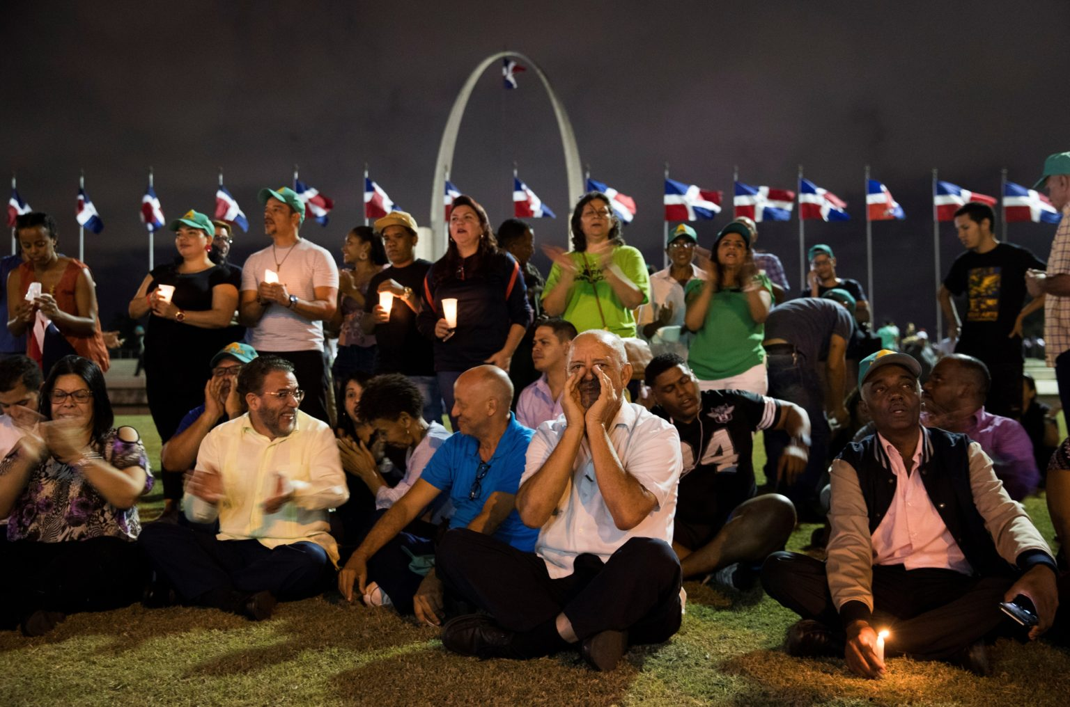 Decenas de personas protestan en la noche del domingo frente a la sede de la Junta Central Electoral, tras la suspensión de las elecciones municipales que se celebraban en el país por múltiples problemas técnicos con el voto automatizado, en Santo Domingo (República Dominicana). La Junta Central Electoral (JCE) de República Dominicana suspendió las elecciones municipales que se celebraban este domingo en el país tras múltiples problemas técnicos con el voto automatizado, que se utiliza por primera vez, aunque de manera parcial. EFE/Orlando Barría